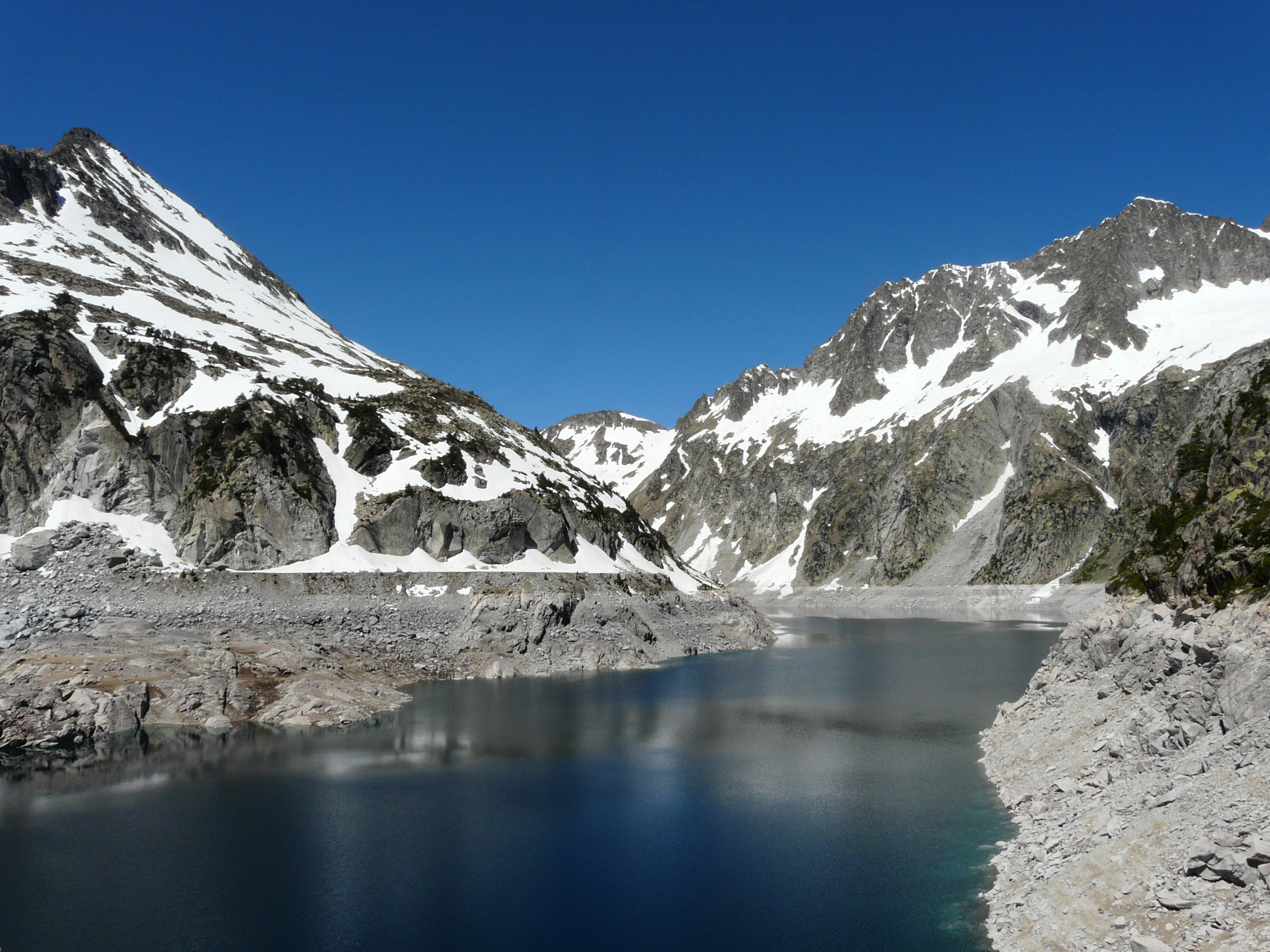 Le lac de Cap-de-Long en cours de remplissage, vu de l'est, Aragnouet, Hautes-Pyrénées, France.